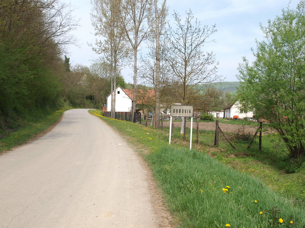 Ulaz u selo Dubovik, Brodsko-posavska županija.